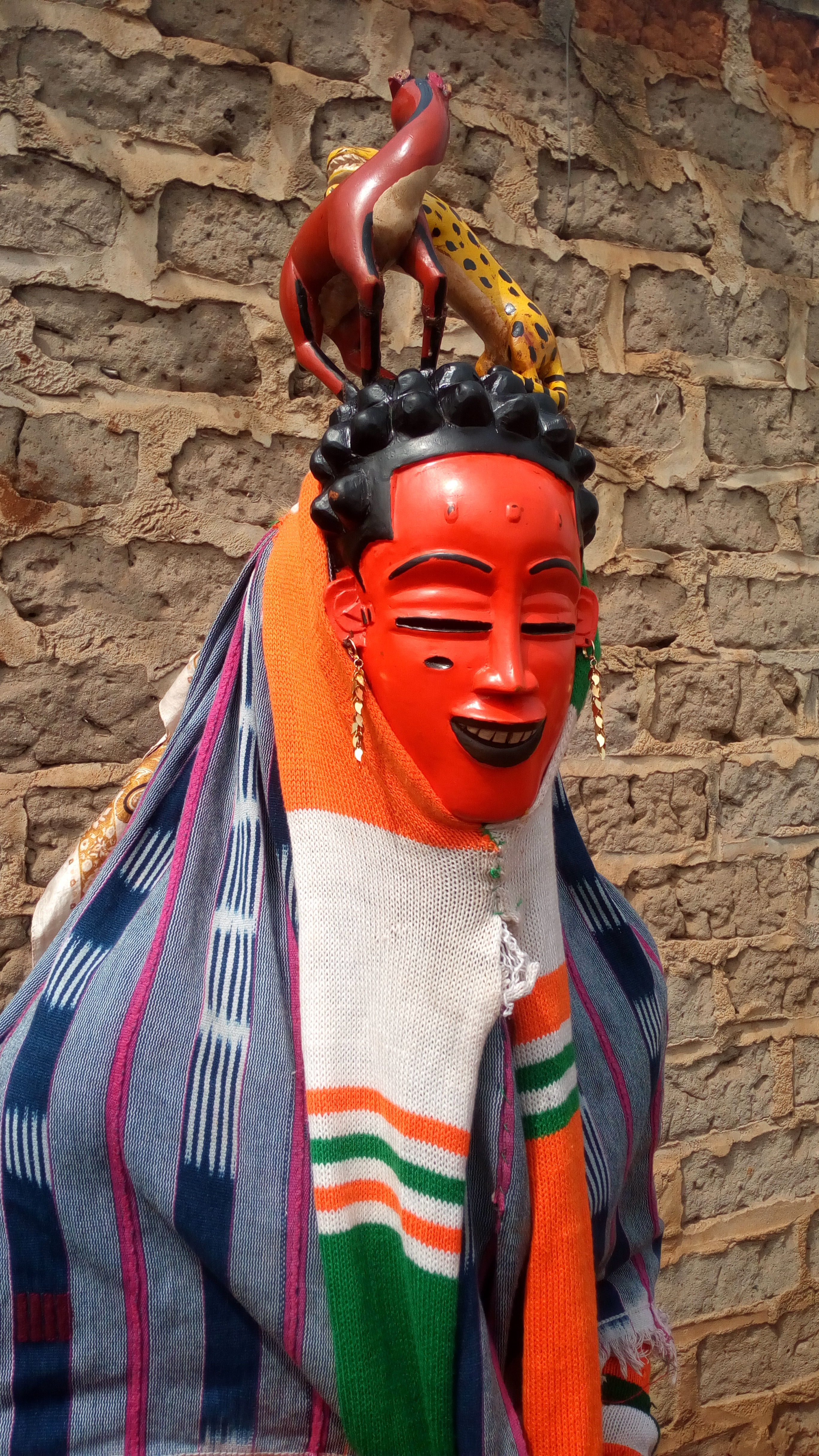 Le Zaouli est un masque de l'ethnie Gouro, peuple de l'ouest de la Côte d'Ivoire This is an image of music and dance from Côte d'Ivoire